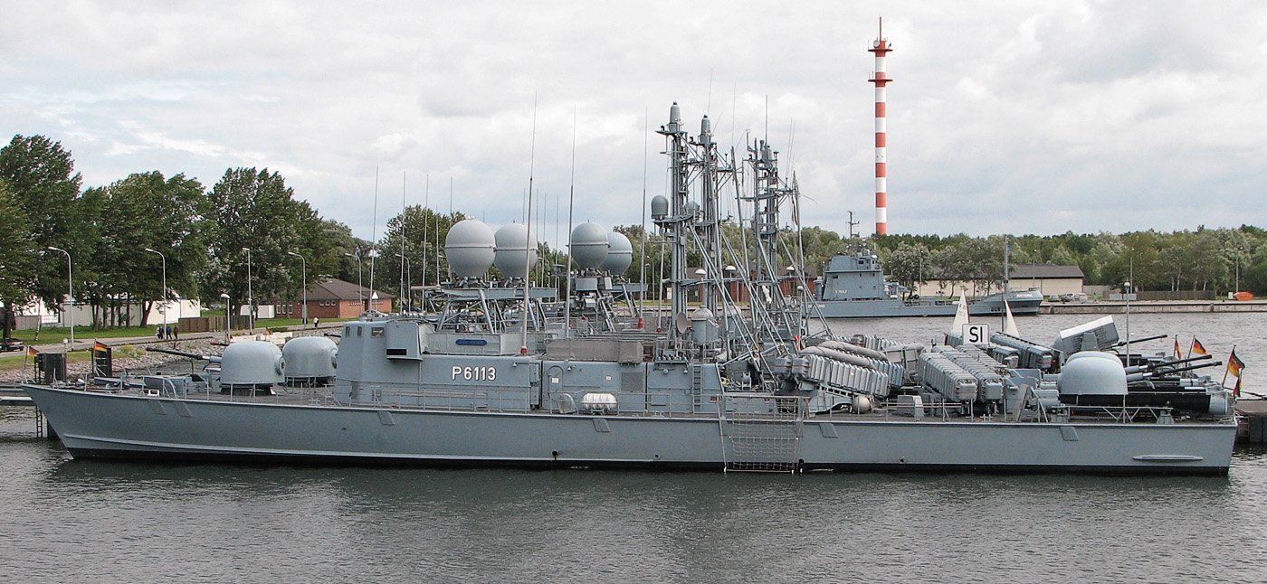 Beschreibung: Schnellboote der Albatros-Klasse (Anzahl 3). Im Vordergrund S 63 Geier. 2. von hinten ein Boot der Gepard-Klasse (es könnte sich auch um S 69 Habicht handeln der ebenfalls einen RAM starter erhielt) / Marinestützpunkt Hohe Düne Fotograf: Darkone, 13. August 2005